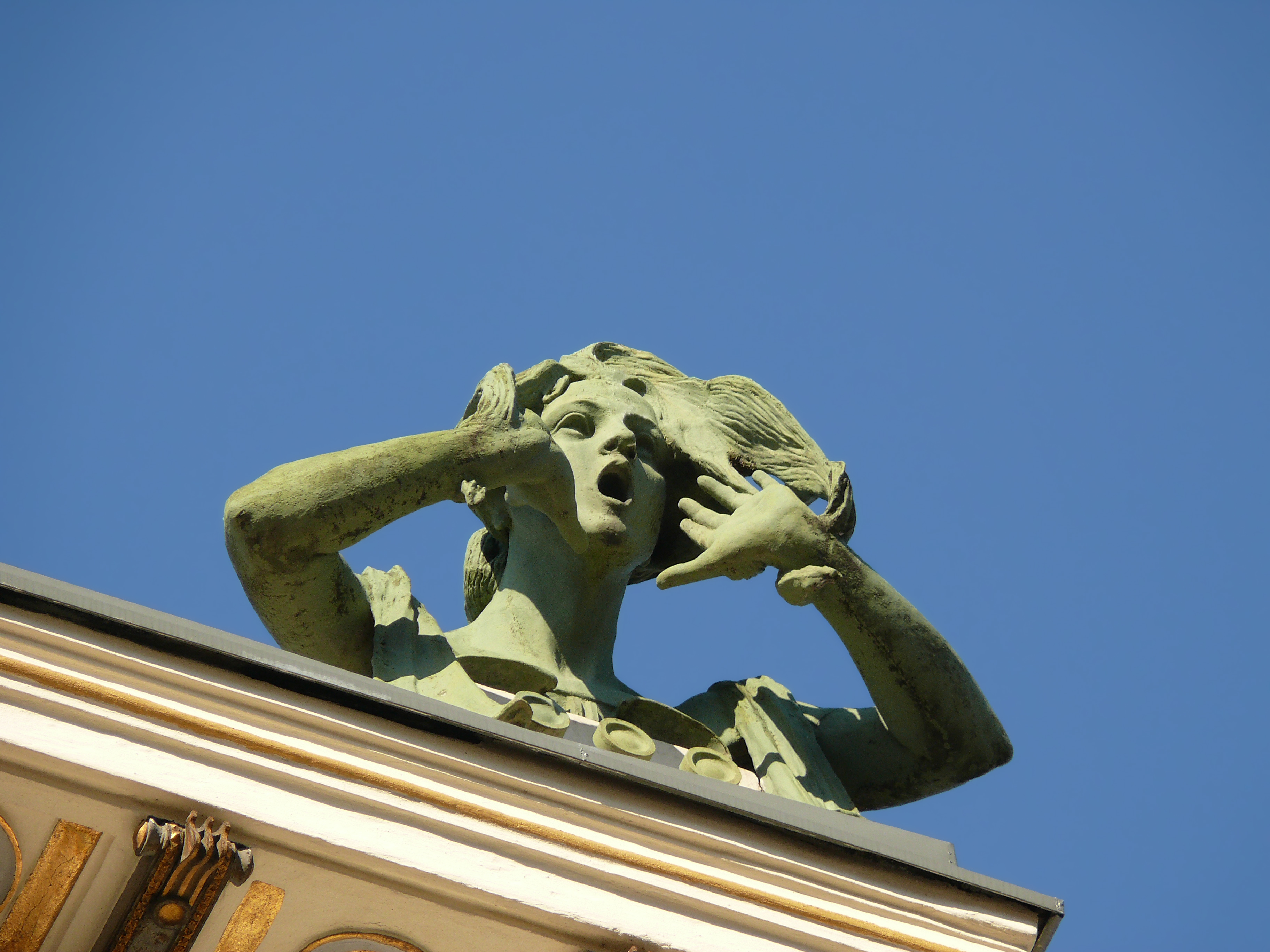 Miethaus